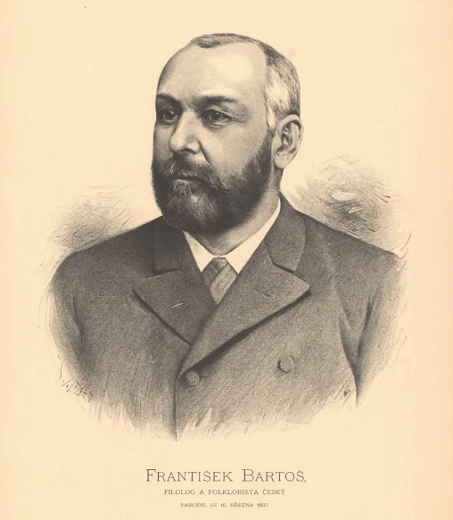 František Bartoš (1837-1906), moravský etnograf